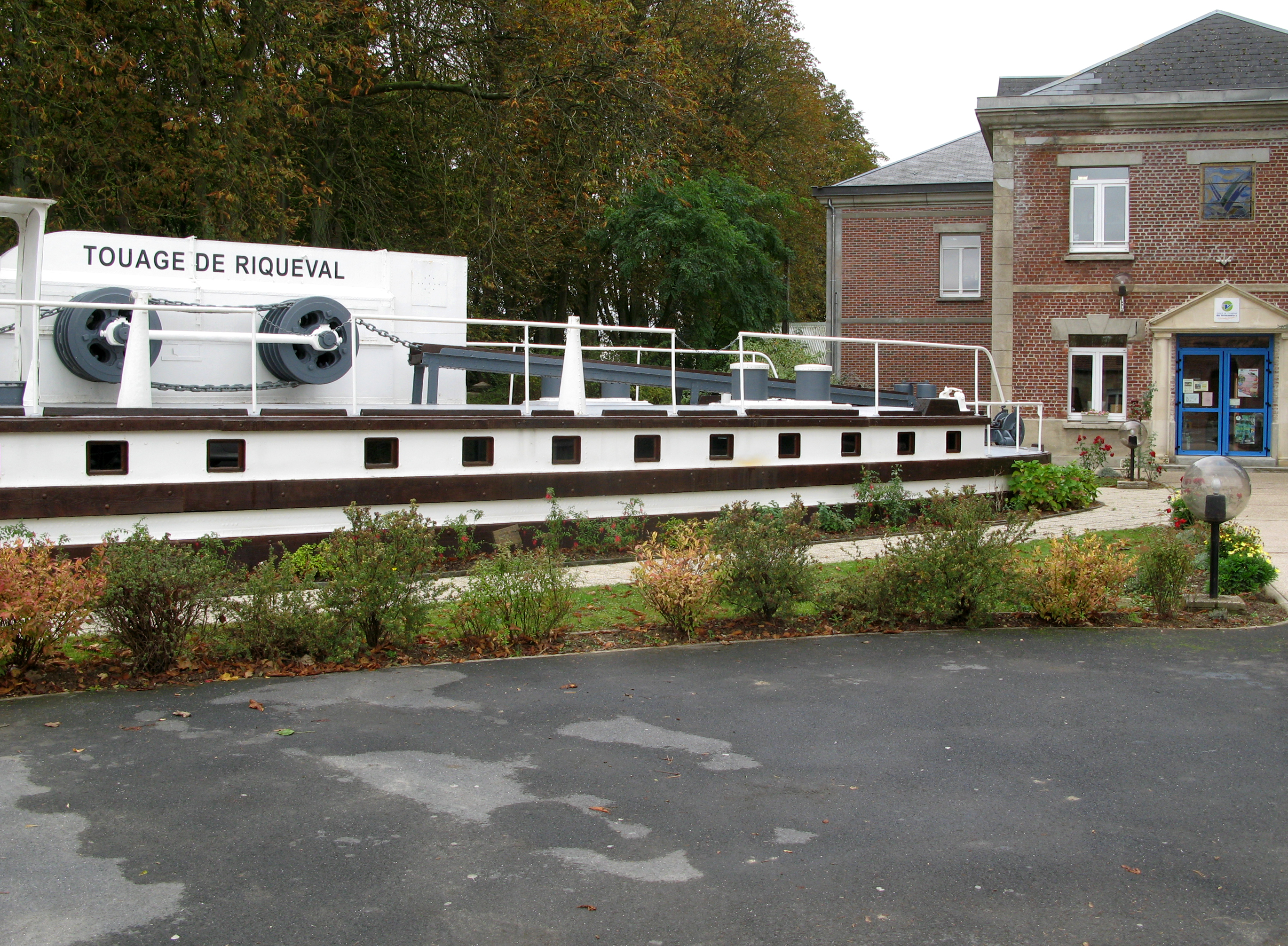 Riqueval, hameau de Bellicourt (Aisne, France) - Le touage. Le Musée du touage est installé dans l'ancien toueur, visible à l'entrée de l'"Office de tourisme du Vermandois". .